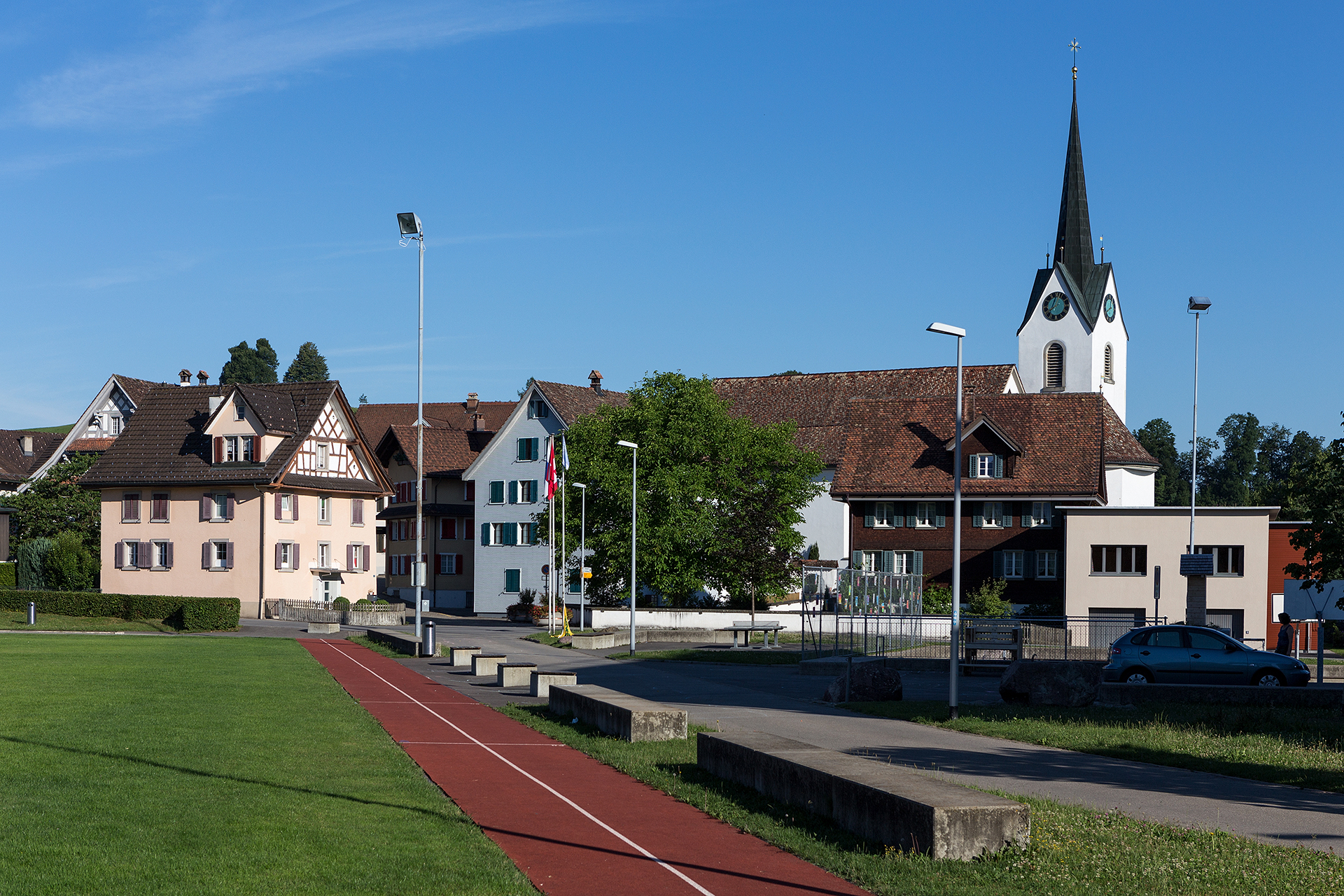 Dorfkern von Neuheim (ZG)